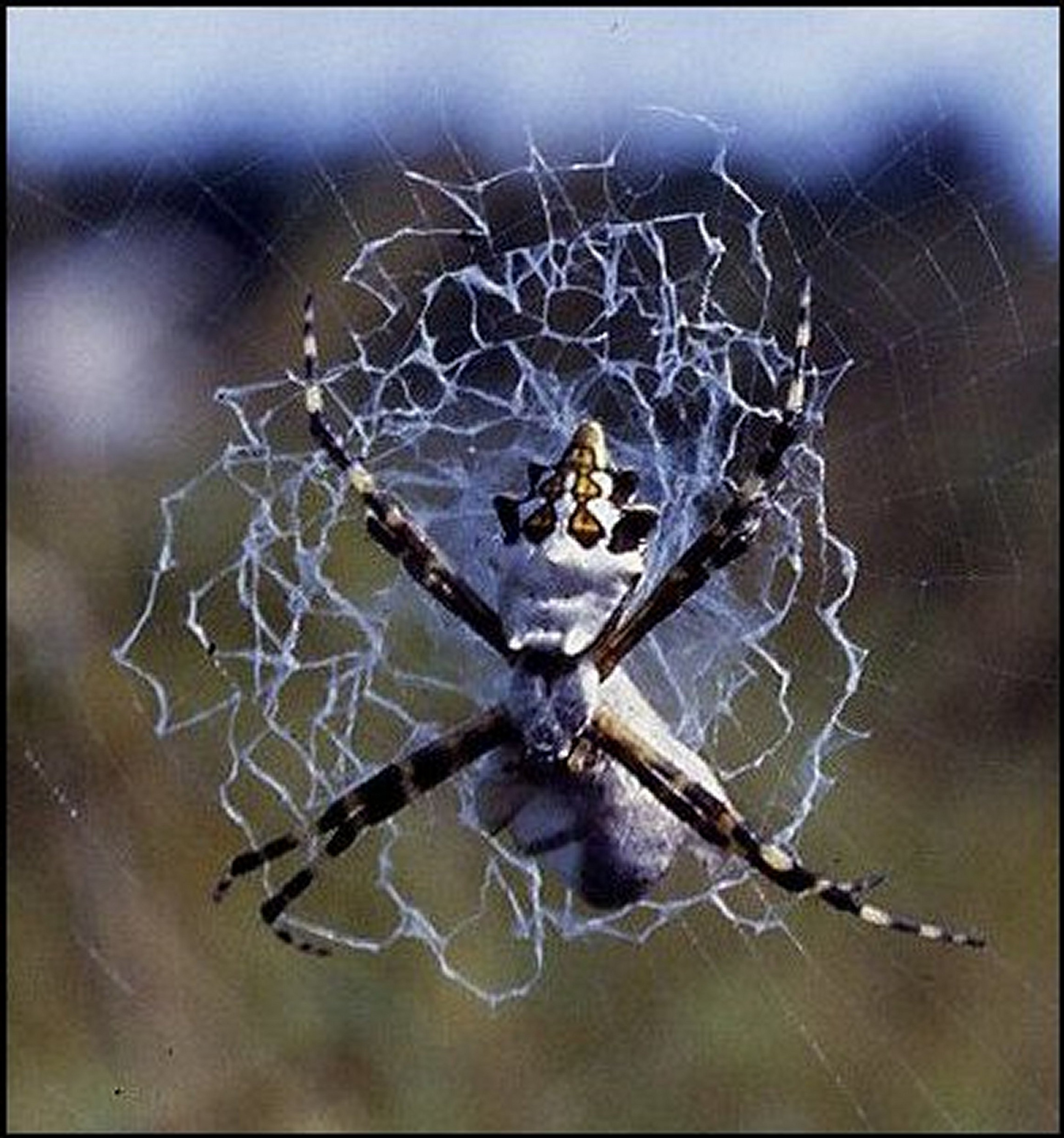 Argiope argentata femelle, avec une proie, sur le moyeu de sa toile pourvu d'un stabilimentum "circulaire".Martinique. D'après une diapositive.